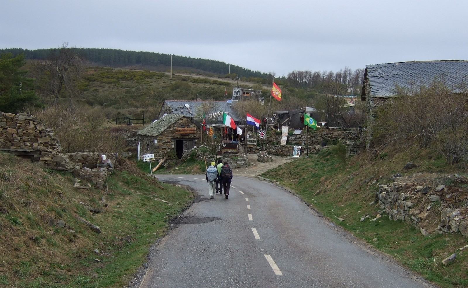 Manjarin im April 2009 selbst fotografiert